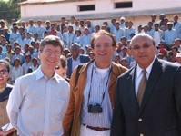 Jeffrey Sachs con l'amabasciatore ONU, Zina Andrianarivelo, e al centro Pierpaolo Saporito, presidente OCCAM - Osservaotrio per la comunicazione digitale. A seguito della visita di Jeffrey Sachs il villaggio di Sambaina venne proclamato Millannium Village, nel 2006.